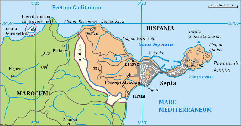 Septae tabula